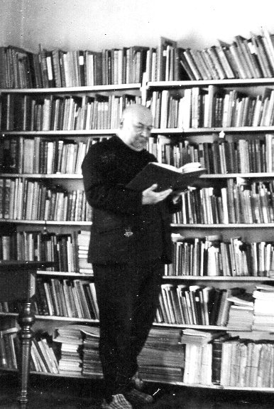 Pfarrer Joseph Weigert in seiner Bibliothek im Pfarrhof von Mockersdorf